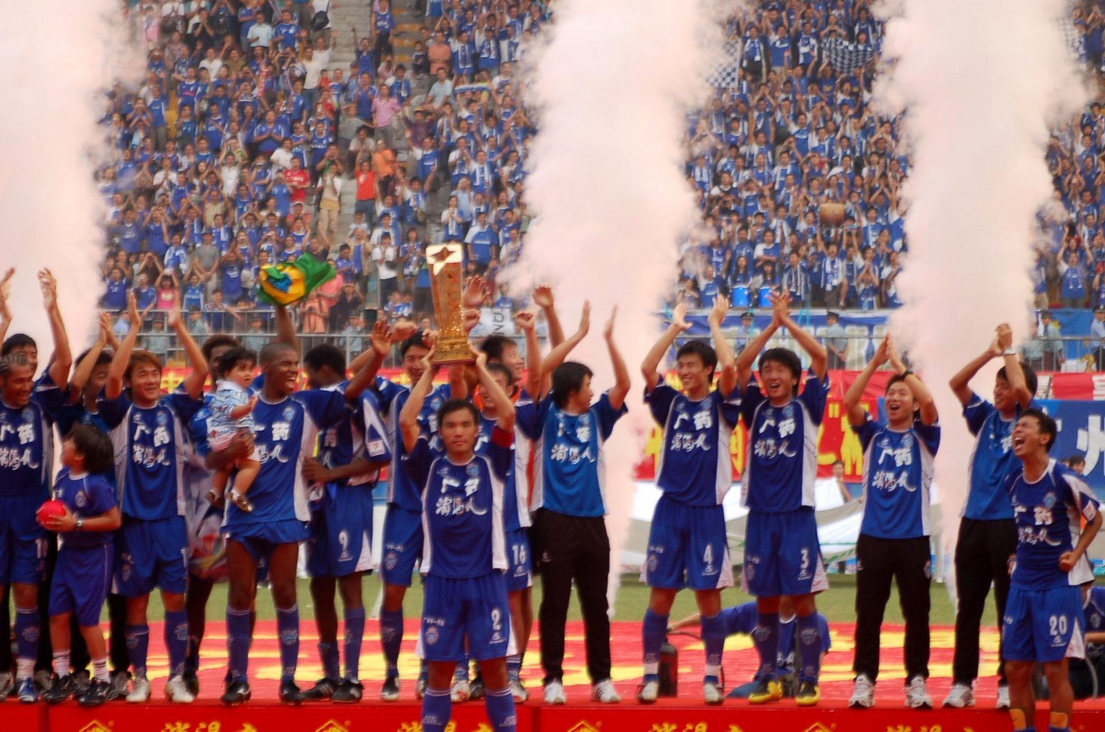 2007年中国足球甲级联赛冠军颁奖仪式，广州医药举杯瞬间